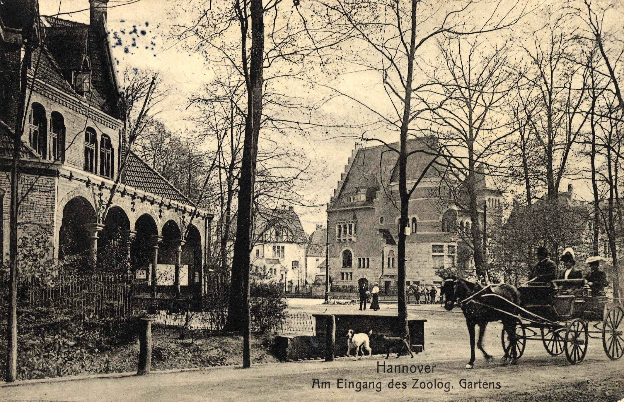 Bildseite der im Lichtdruckverfahren durch den Papierwarengroßhändler Georg Kugelmann hergestellten Ansichtskarte mit der laufenden Nummer 548 von 1908 (siehe unten, Adressseite) mit einem Blick über den alten Schiffgraben vor dem ehemaligen Eingang zum Zoo Hannover. Hinter dem Einspänner ist eine weitere Kutsche zu sehen, dahinter offensichtlich während der Luftangriffe auf Hannover im Zweiten Weltkrieg zerstörte Villen an der (heutigen) Hindenburgstraße Ecke (heutiger) Adenauerallee ...